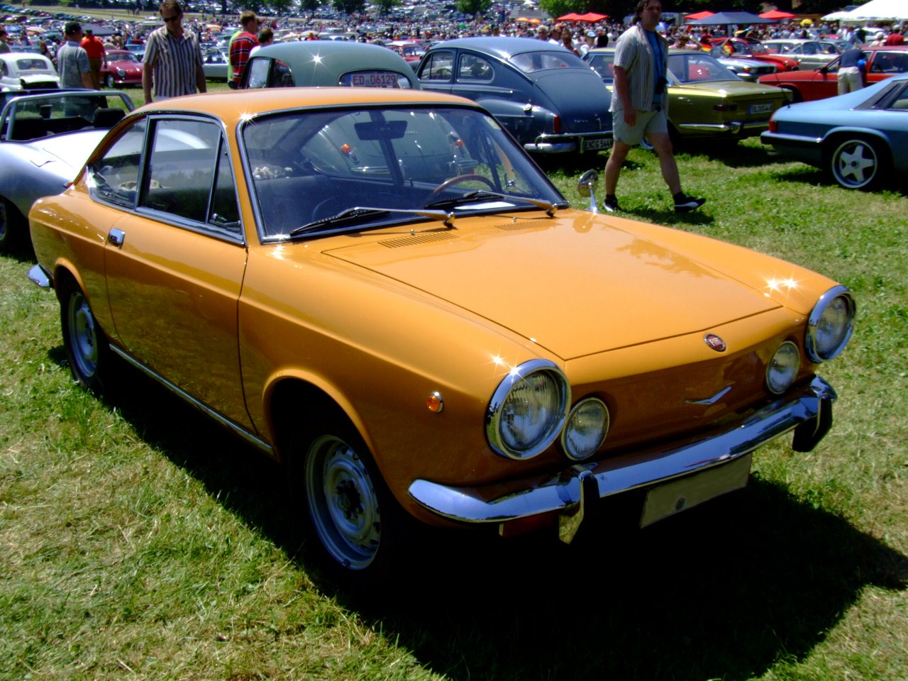 Fiat 850 Sport Coupé (1968-1971) Fiat 850 Sport Baujahr: 1969 52 PS